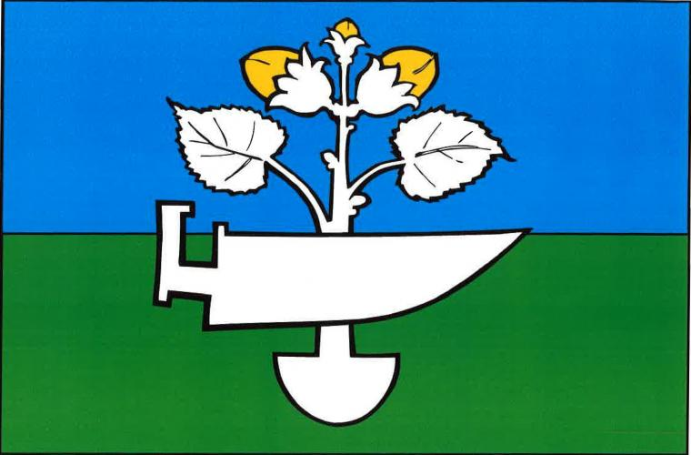 Poličná vlajka